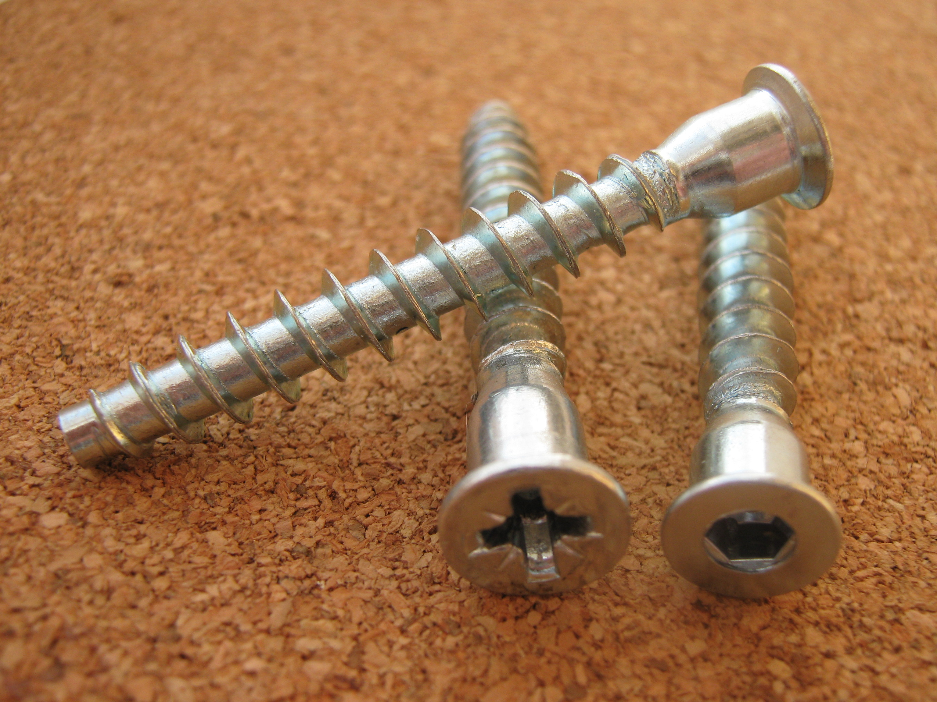 Конфирмат